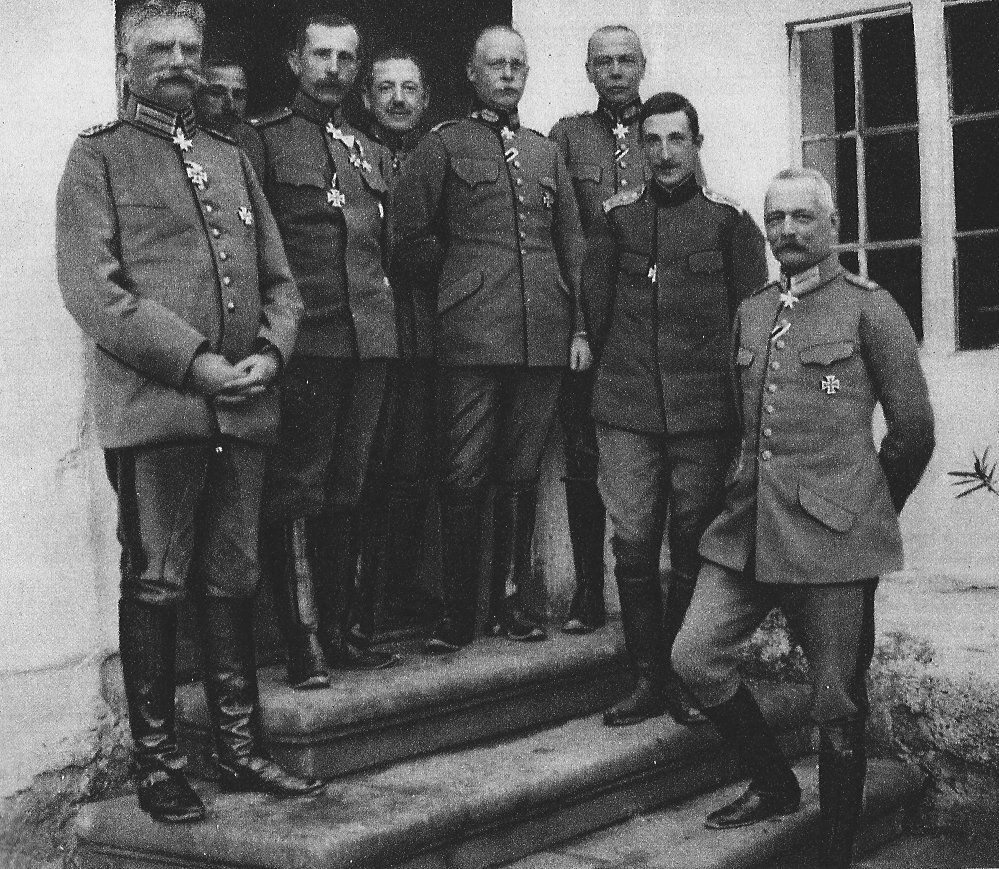 le haut commandement de la Triplice à Paracine (Serbie), de droite à gauche: Von_Falkenhayn, le prince Boris de Bulgarie, von_Seeckt (général de brigade et chef d'état-major de Mackensen), général Tappen (chef des opérations à l'état-major), colonel Gantscheff, Schekoff (commandant en chef de l'armée bulgare), von_Mackensen commandant en chef des armées alliées.